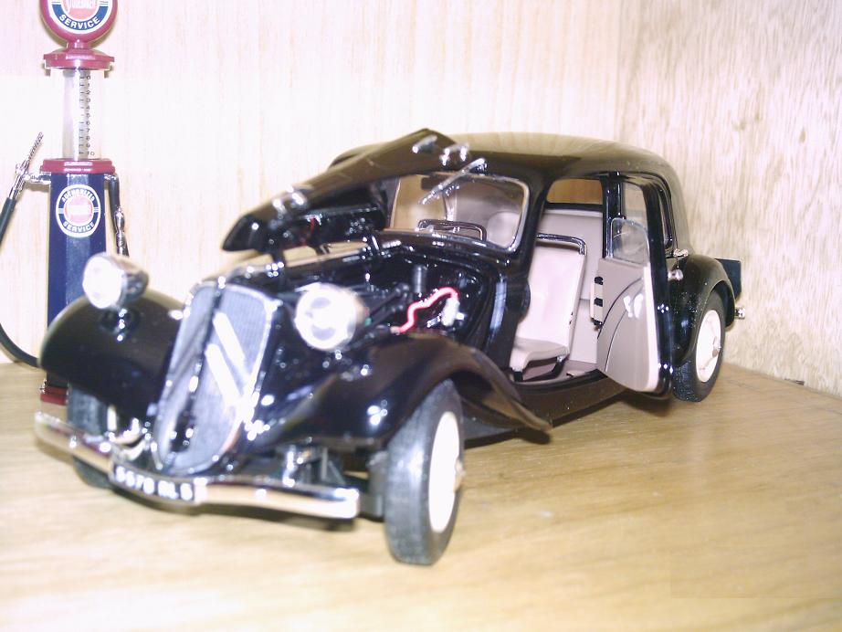 Model Citroenu 11B 1/18 Solido